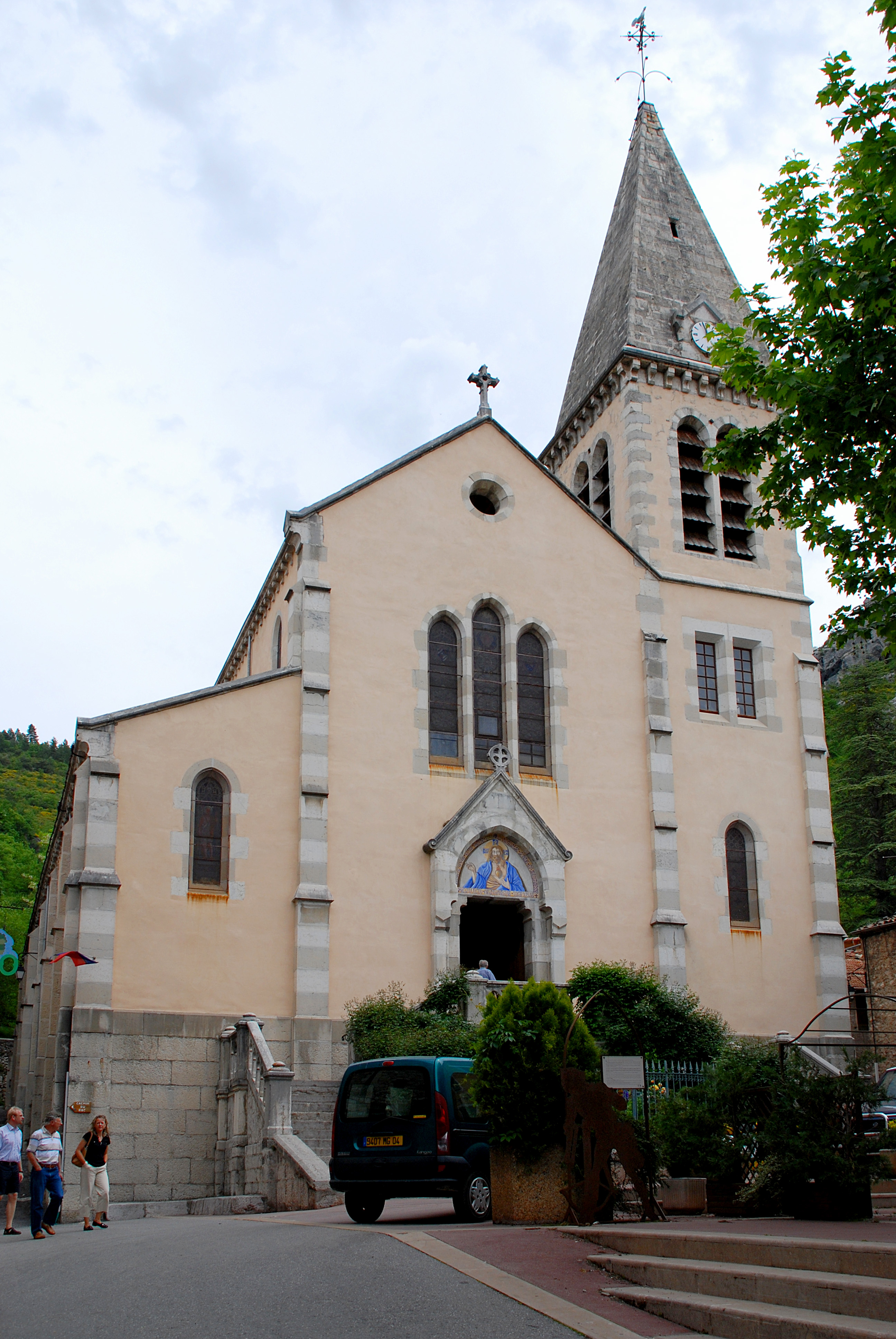 Castellane, église du Sacré-Cœur